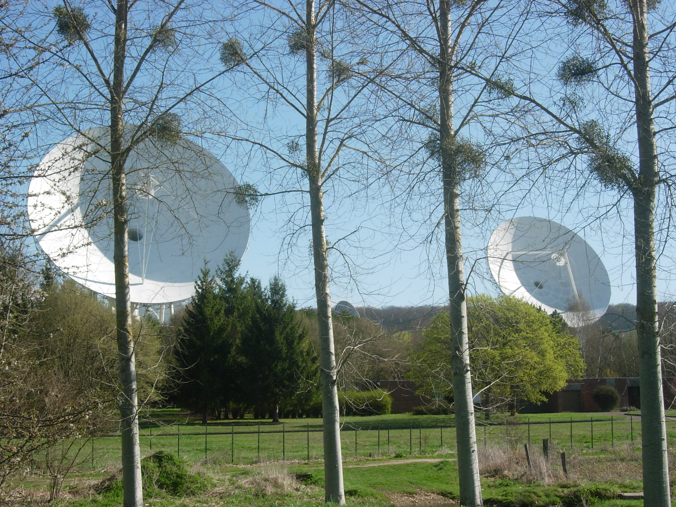 Bercenay-en-Othe (Aube)